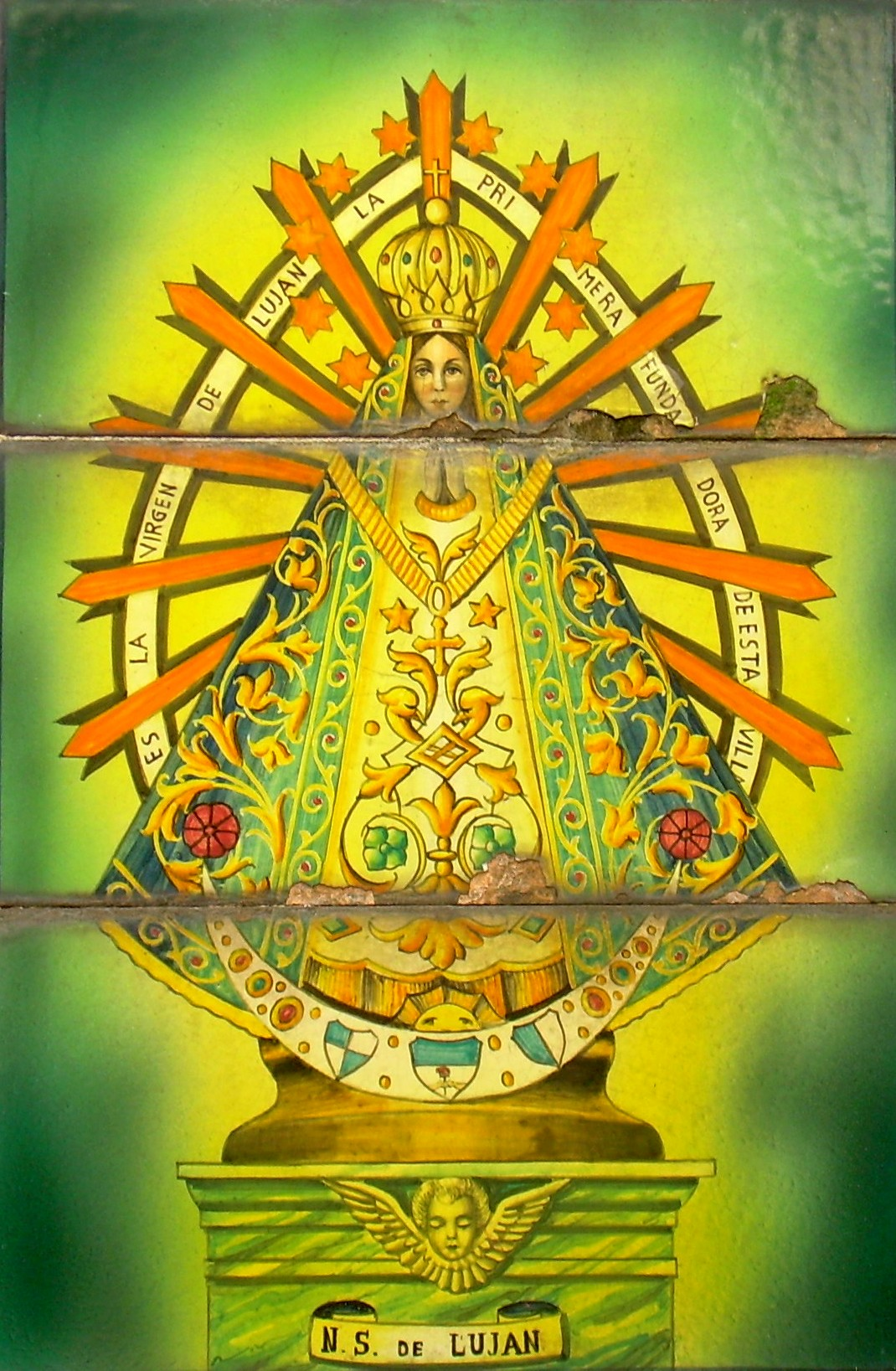 representacion personala e de mei de 70 annadas, libra de cap dret e autorizat per Common